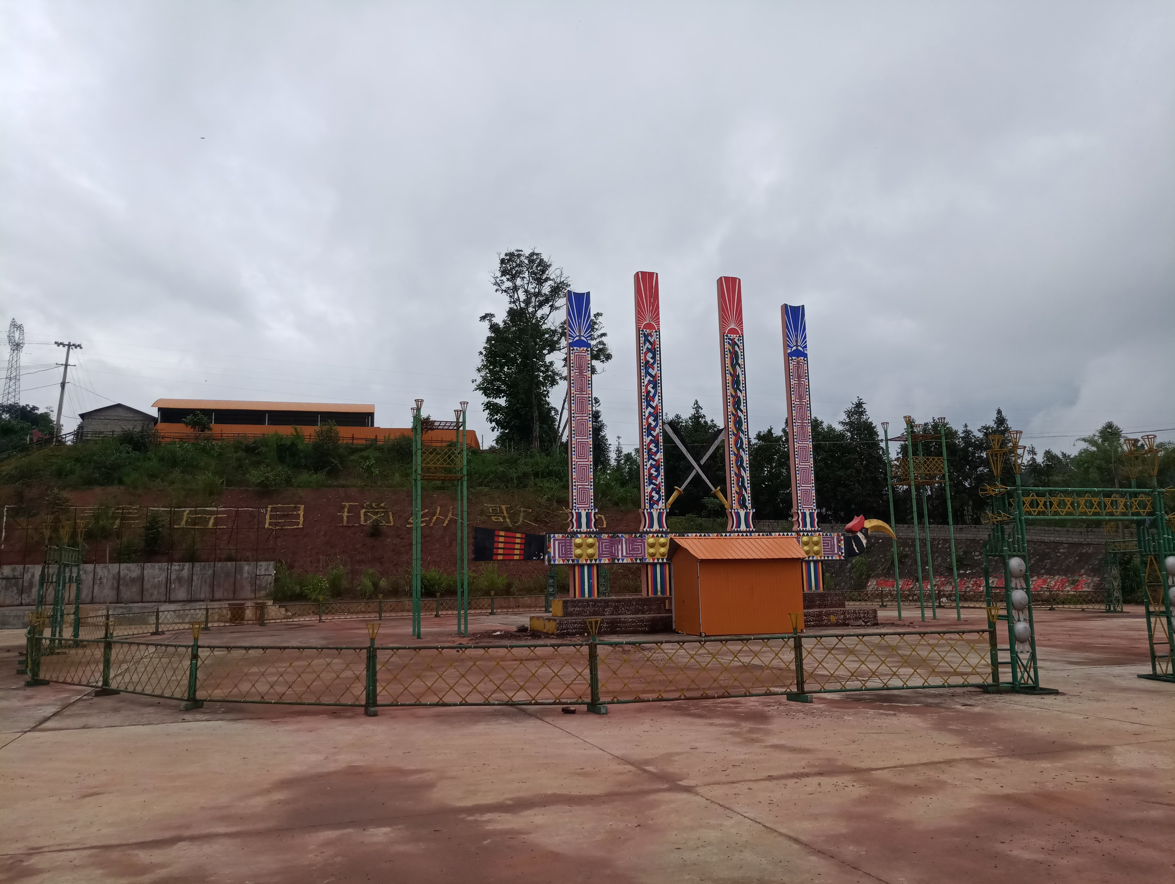 中文（中国大陆）: 弄丘村目脑纵歌场